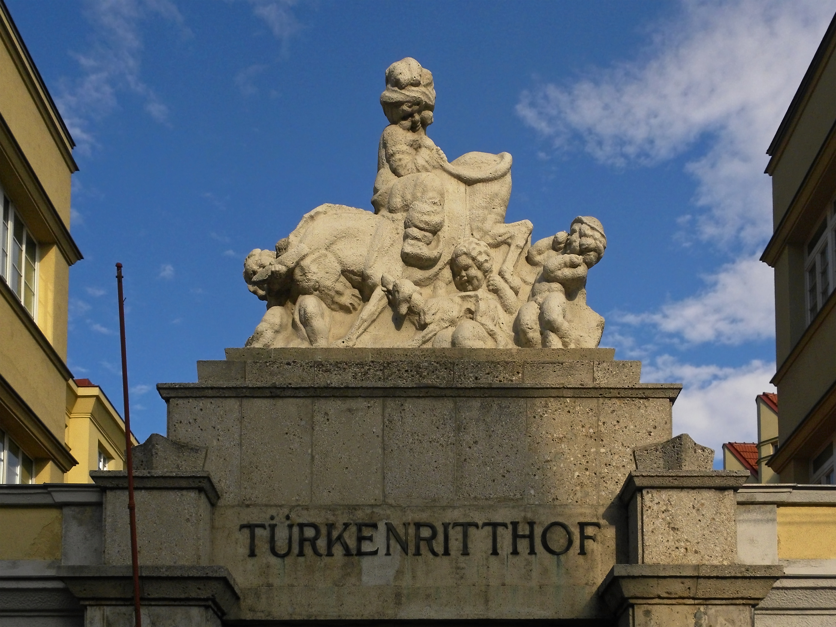 Sozialer Wohnbau, Türkenritthof - die Steingruppe Türkenritt vom Bildhauer Heinrich Karl Scholz stellt einen früheren Hernalser Brauch zur Verhöhnung der Türken dar